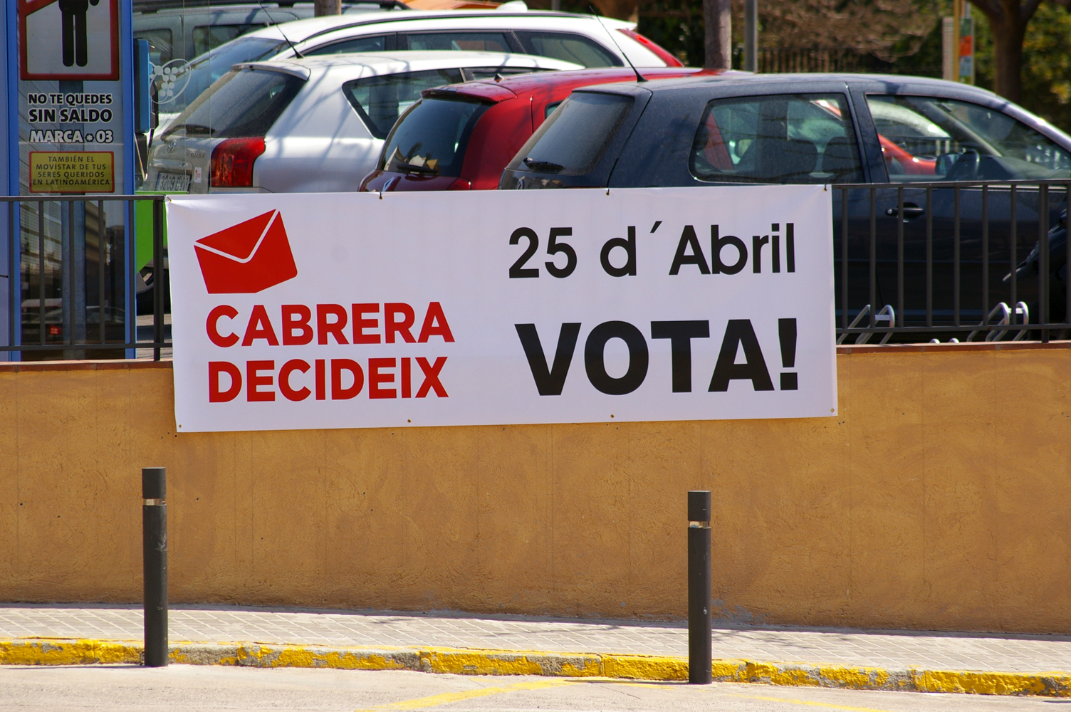 Pancarta a Cabrera de Mar (El Maresme)